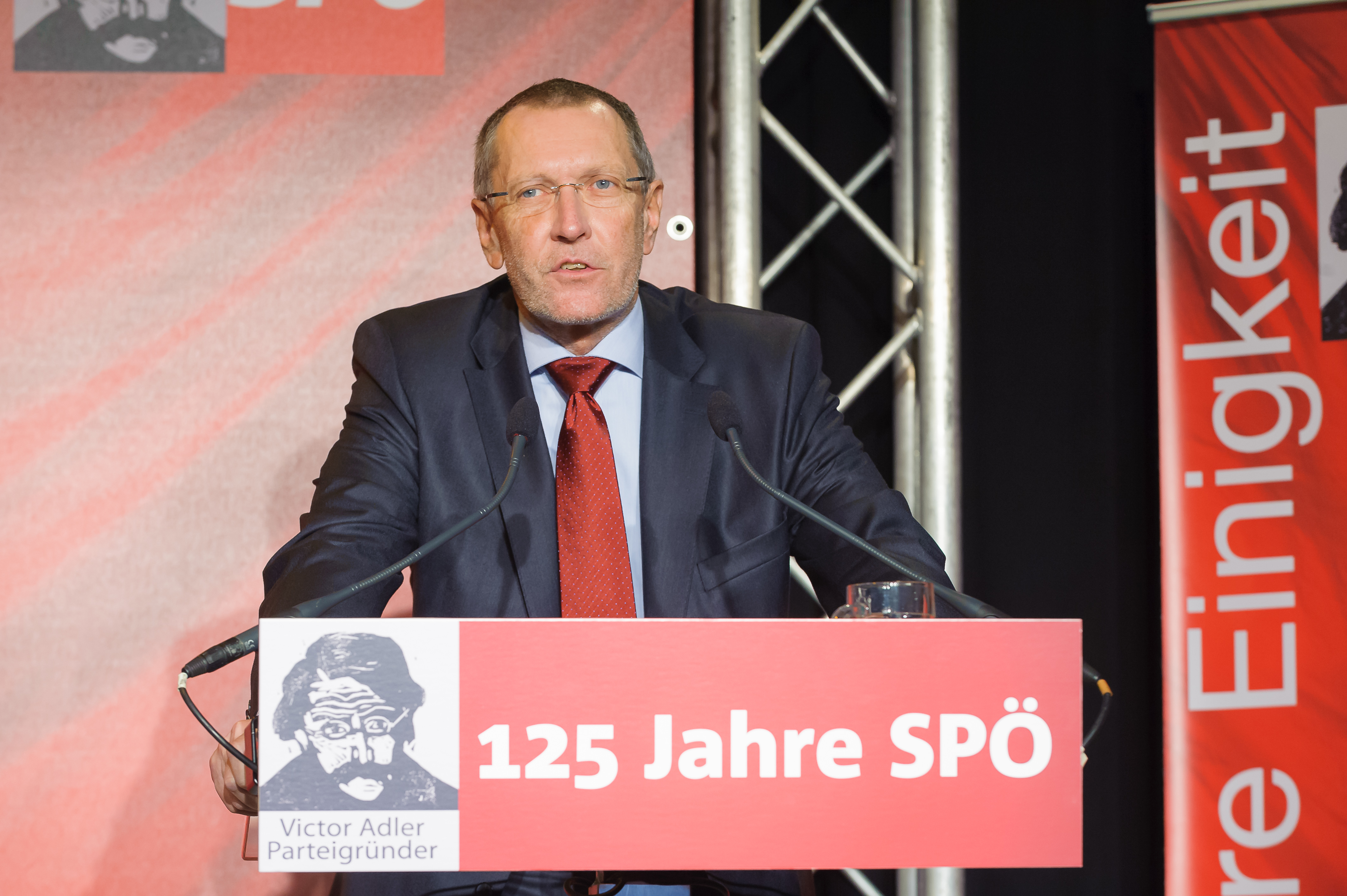 Am 11. Jänner feierte die Sozialdemokratie 125 Jahre Hainfeld.